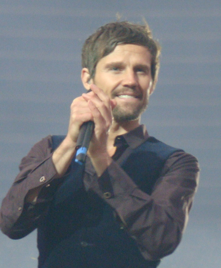 Jason Orange